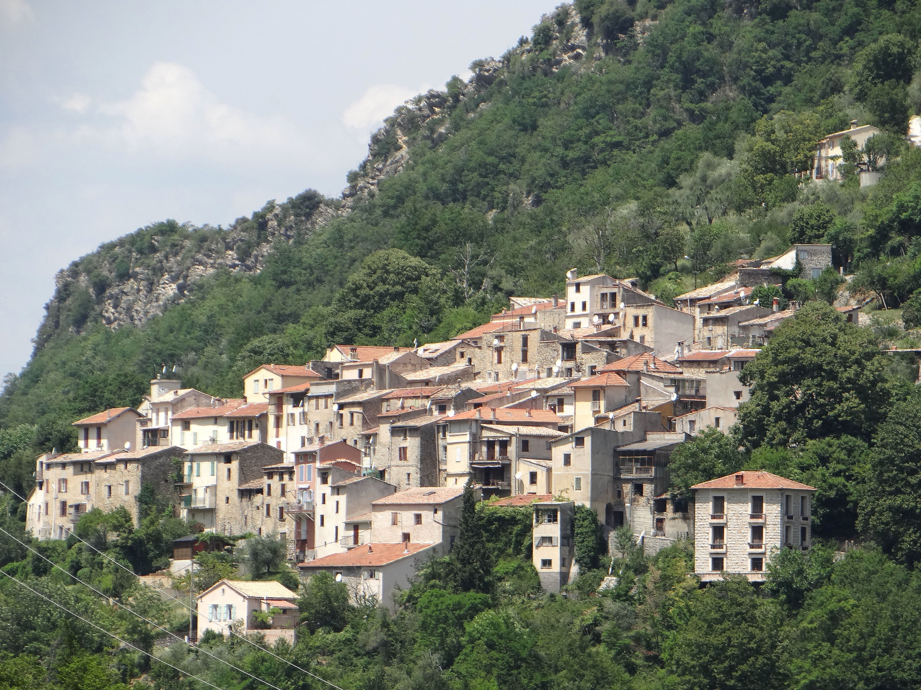 Conségudes - Vue générale